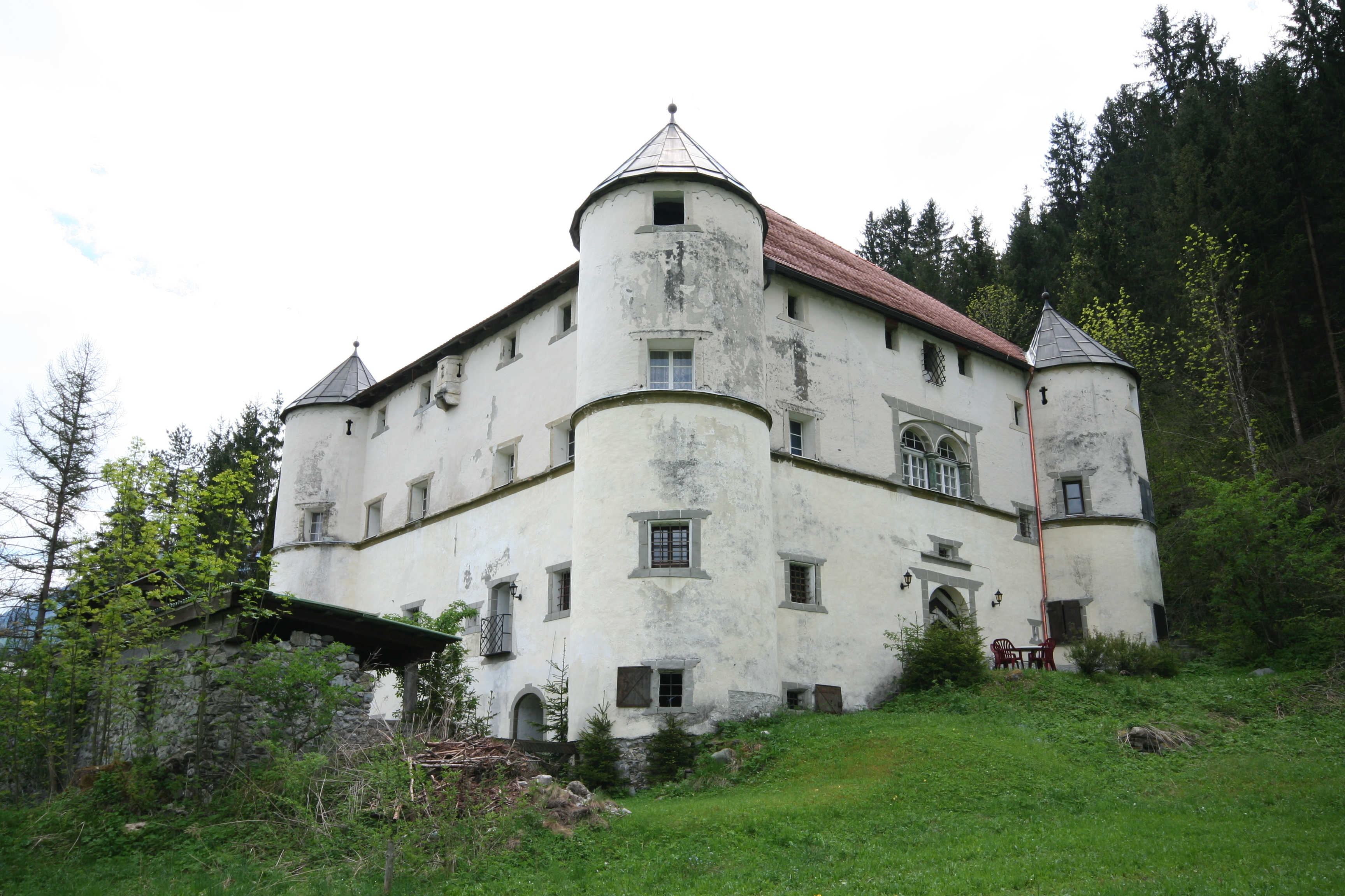 Schloss Weildegg, Würmlach bei Kötschach-Mauthen